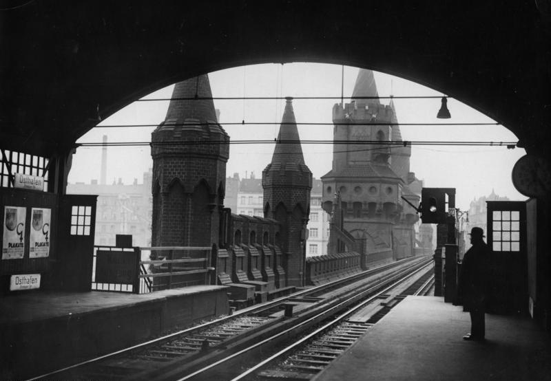 Berlin, Bahnhof Warschauer Strasse ADN-ZB/Archiv Berlin, Januar 1932 Die Gleise der Hochbahn überqueren vom Bahnhof Osthafen (1932 umbenannt in Warschauer Straße) die Spree auf der Oberbaumbrücke. 1107-32 Information added by Wikimedia users.U-Bahnhof Osthafen (Bahnhof Stralauer Tor), here mistakenly referred to as "Warschauer Straße", and eastern end of the Oberbaum bridge in Friedrichshain, Berlin. Korrektur: Der Bahnhof Osthafen wurde nicht in Warschauer Straße umbenannt, sondern wegen Kriegsschäden geschlossen. Warschauer Straße ist ein anderer, nicht mit Osthafen identischer Bahnhof.